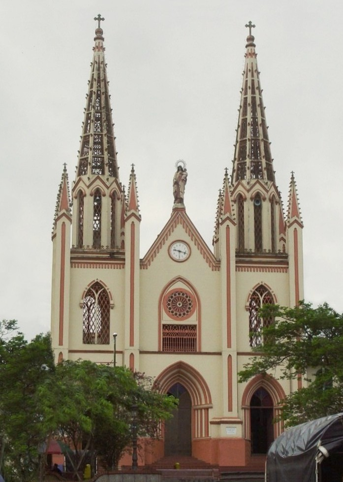 Fachada de la Iglesia de Frontino, Antioquia, Colombia